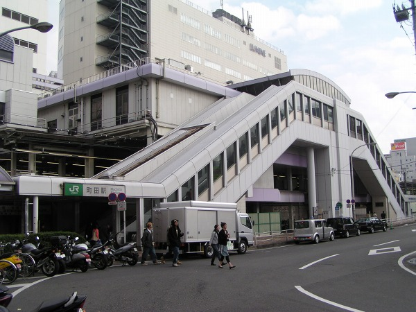 町田駅南口